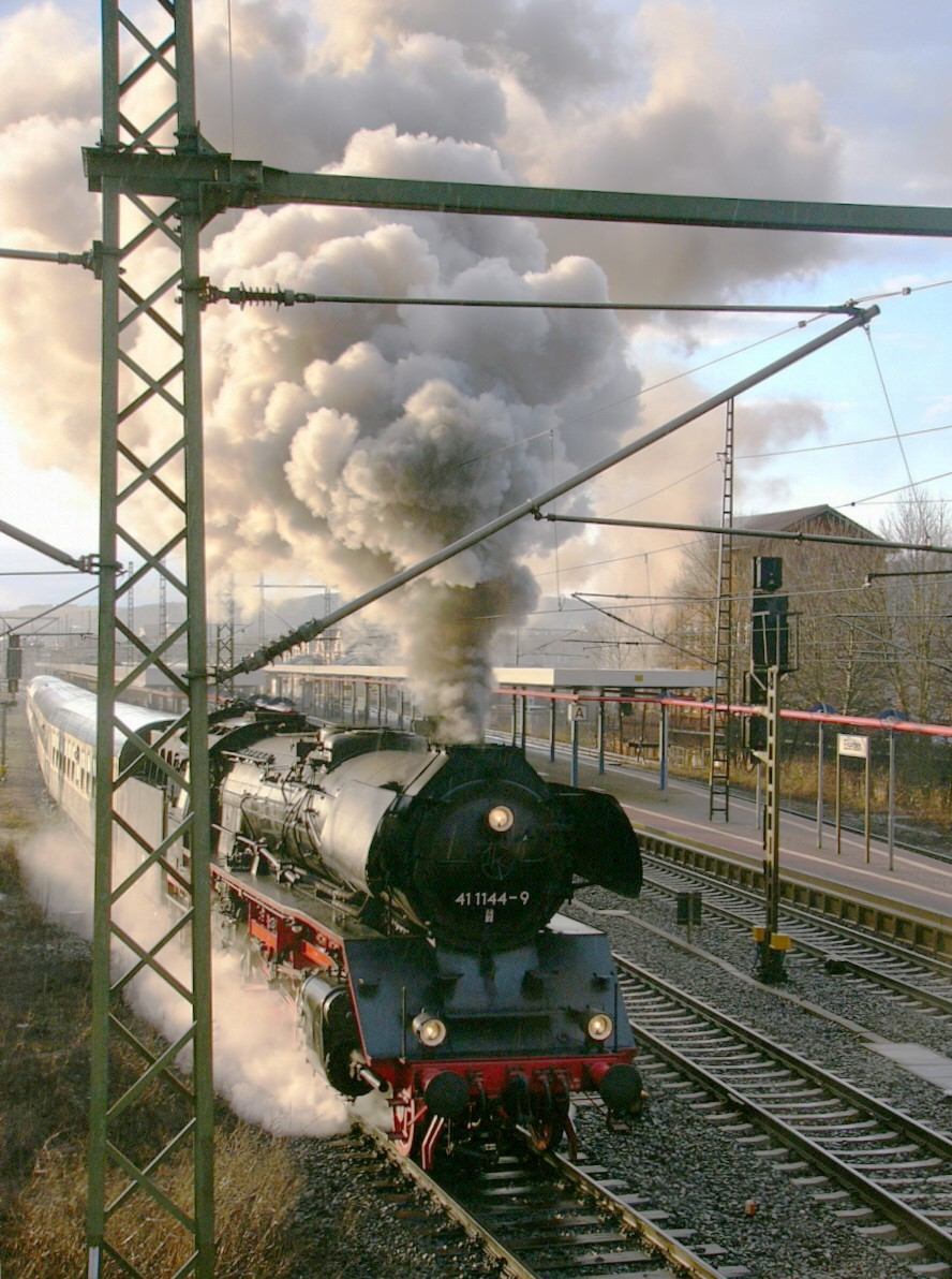 Die Dampflok 41 1144 verlässt mit dem Thüringenzug den abendlichen Eisenacher Bahnhof.